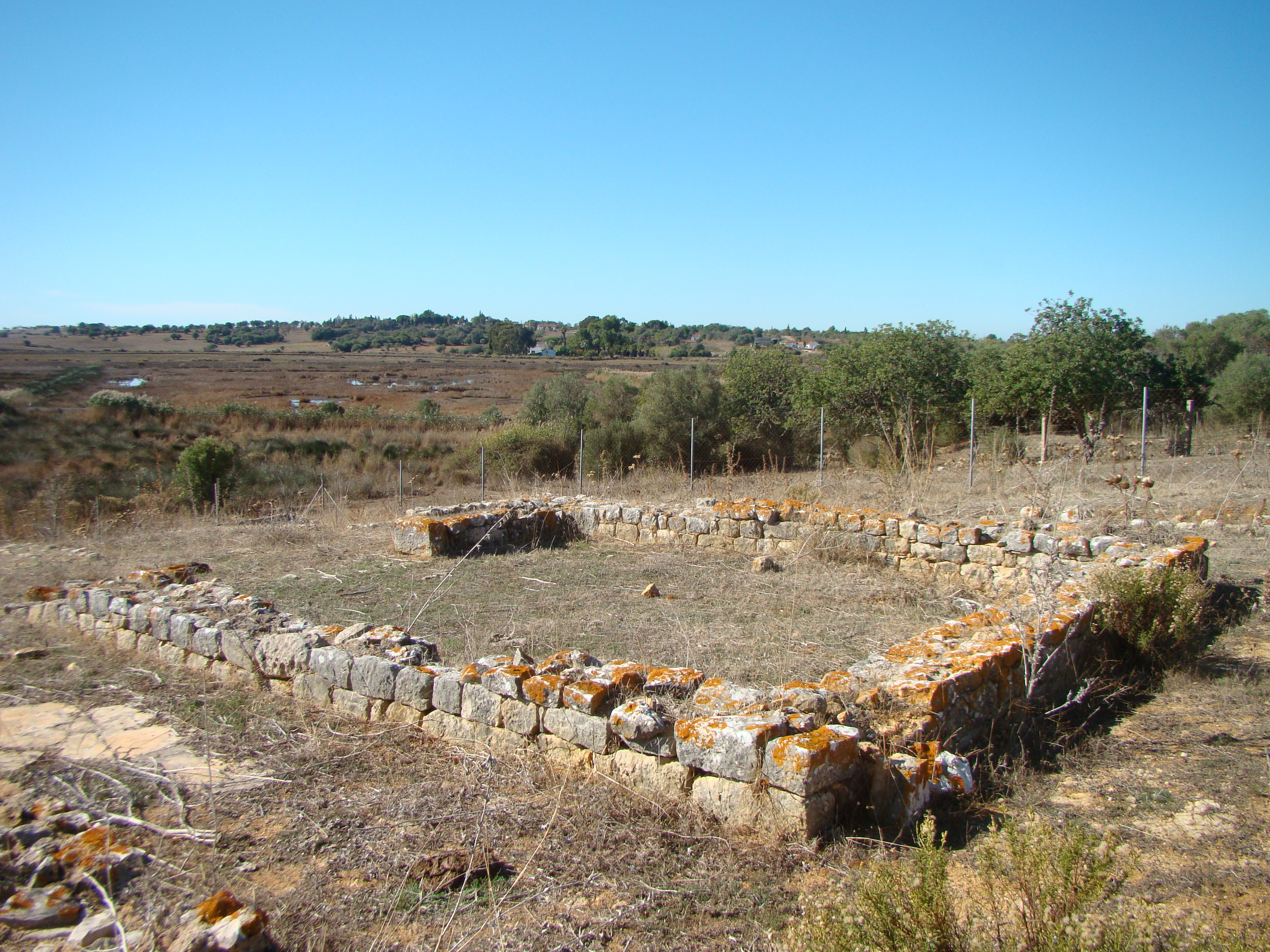 Villa Romana da Abicada 2017 1